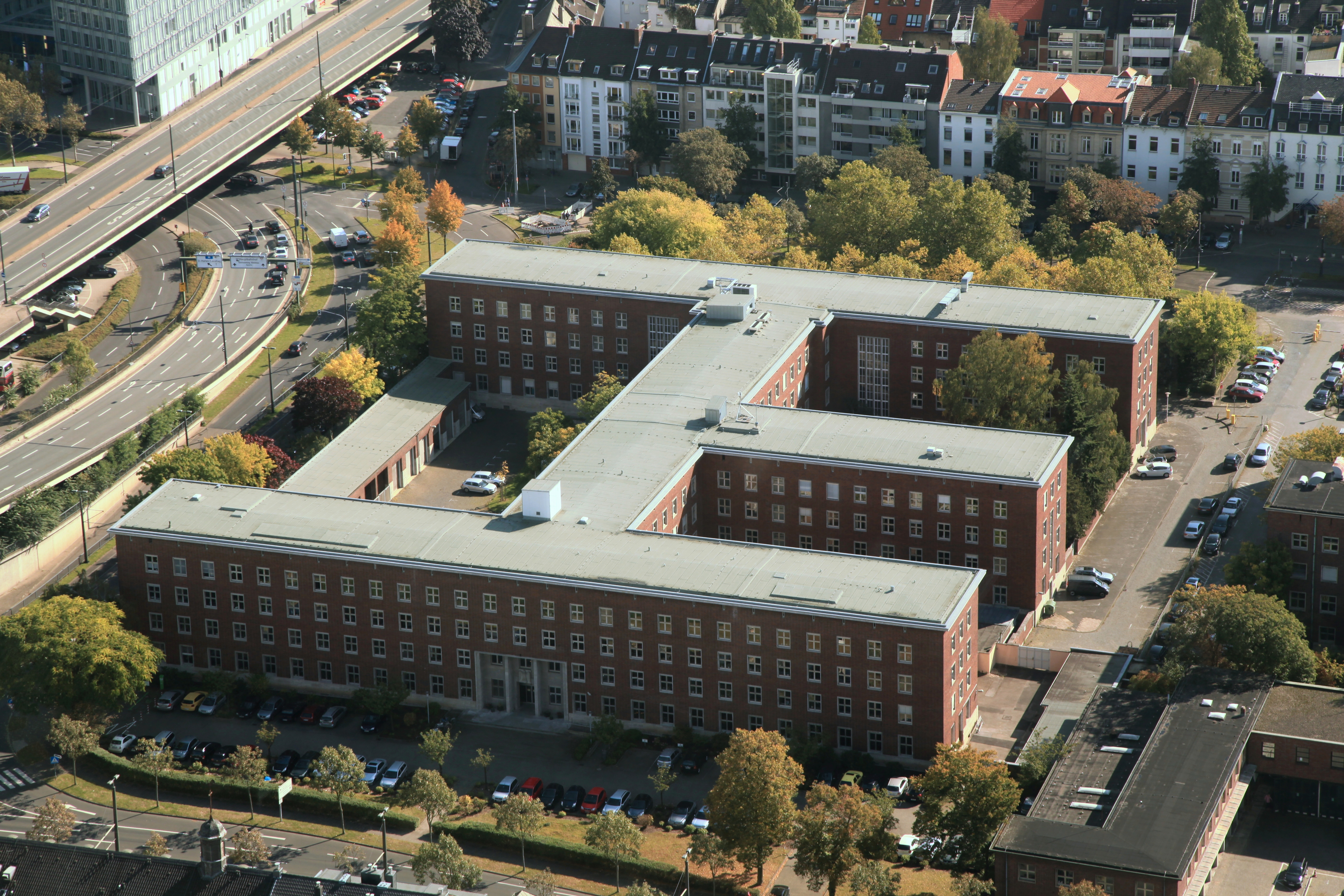 Blick vom Rheinturm zum Gebäude des Ministeriums für Heimat, Kommunales, Bau und Gleichstellung des Landes Nordrhein-Westfalen, Jürgensplatz 1, Atlantikhaus (ehemalige Oberfinanzdirektion in der Kavalleriestraße) in Düsseldorf. Zu sehen das Portal Neusser Straße Nr. 20.